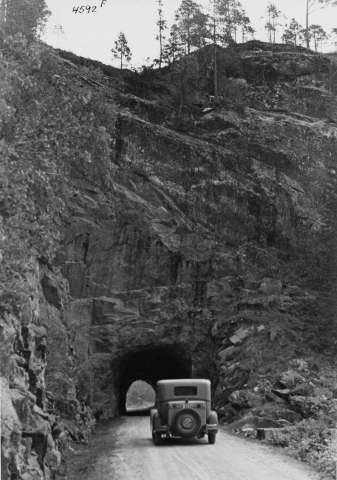 Fjærtunnelen på Bangsund i Namsos, Nord-Trøndelag